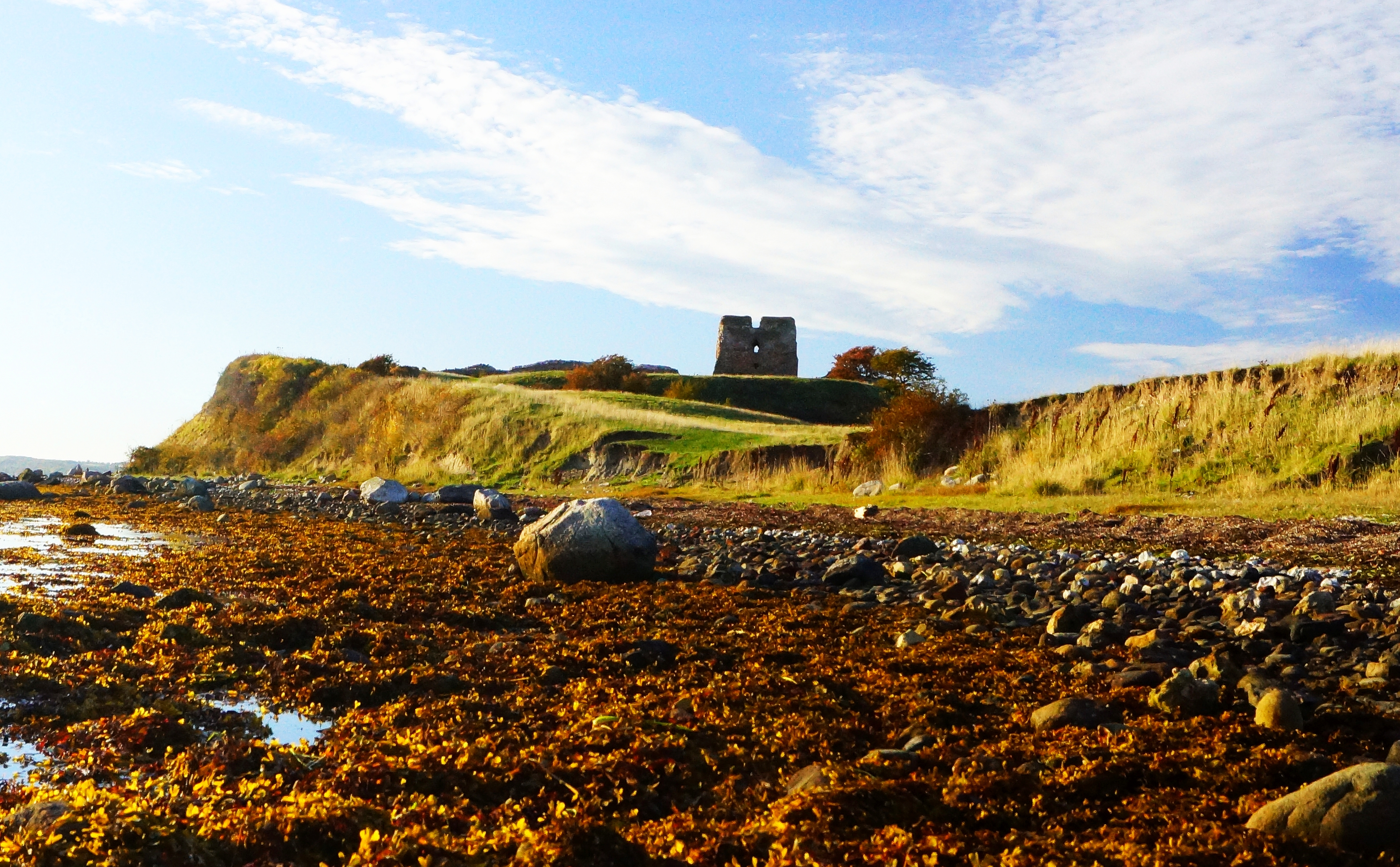 Kalø Slotsruin set fra stranden